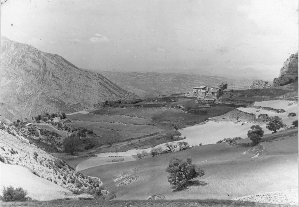 Vista llunyana de Rúbies. Lluís Marià Vidal i Carreras (Entre 1890 i 1922)